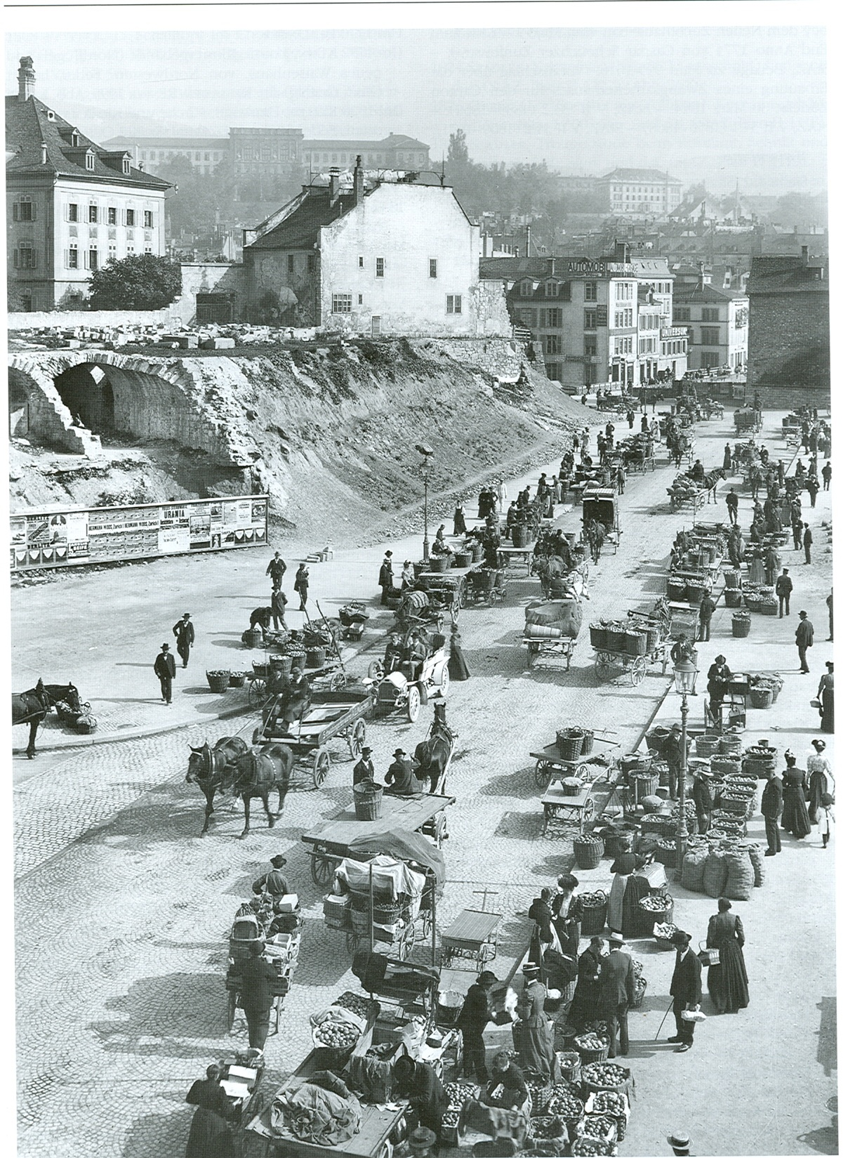 Uraniastrasse in Zürich, 1908, rechts Nordteil des Ostflügels des Klosters Oetenbach mit den Täferzimmern, Foto Ernst Link (†1935)